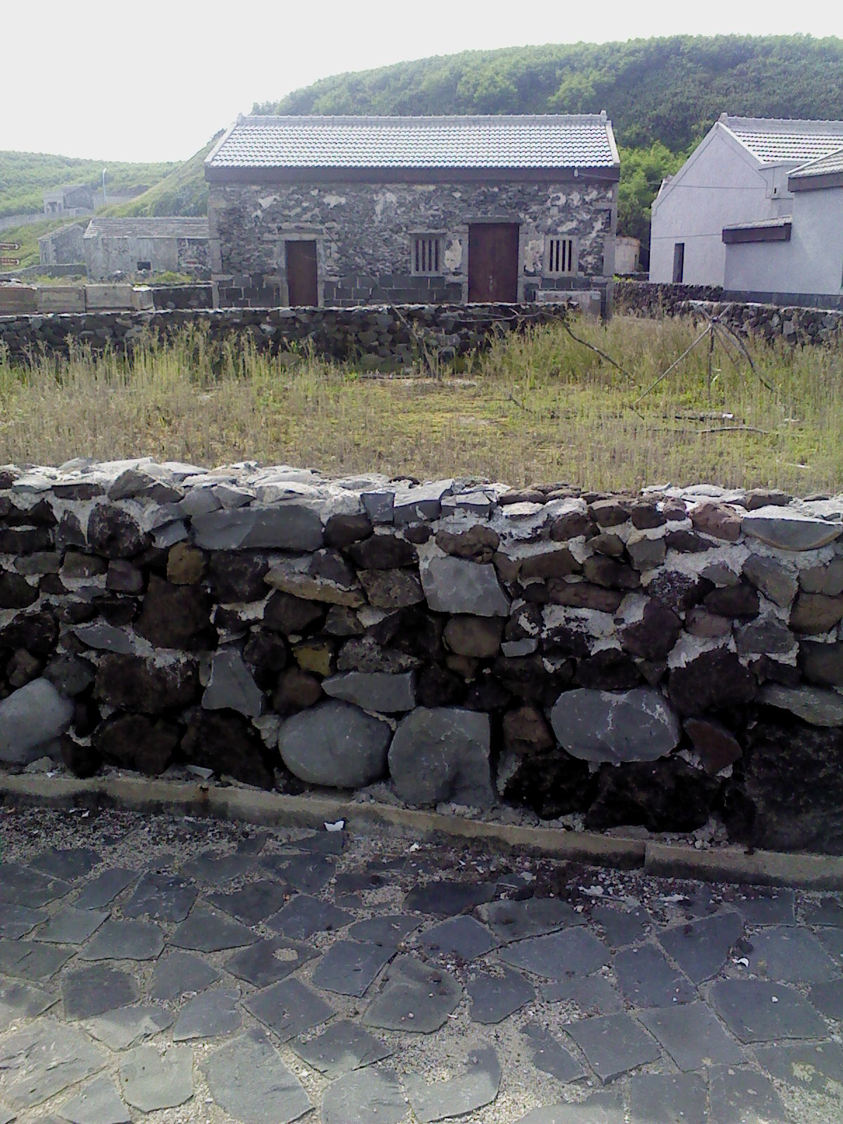 中文（台灣）: 澎湖桶盤嶼之菜宅